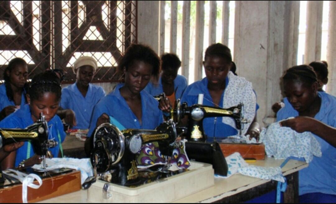 couture